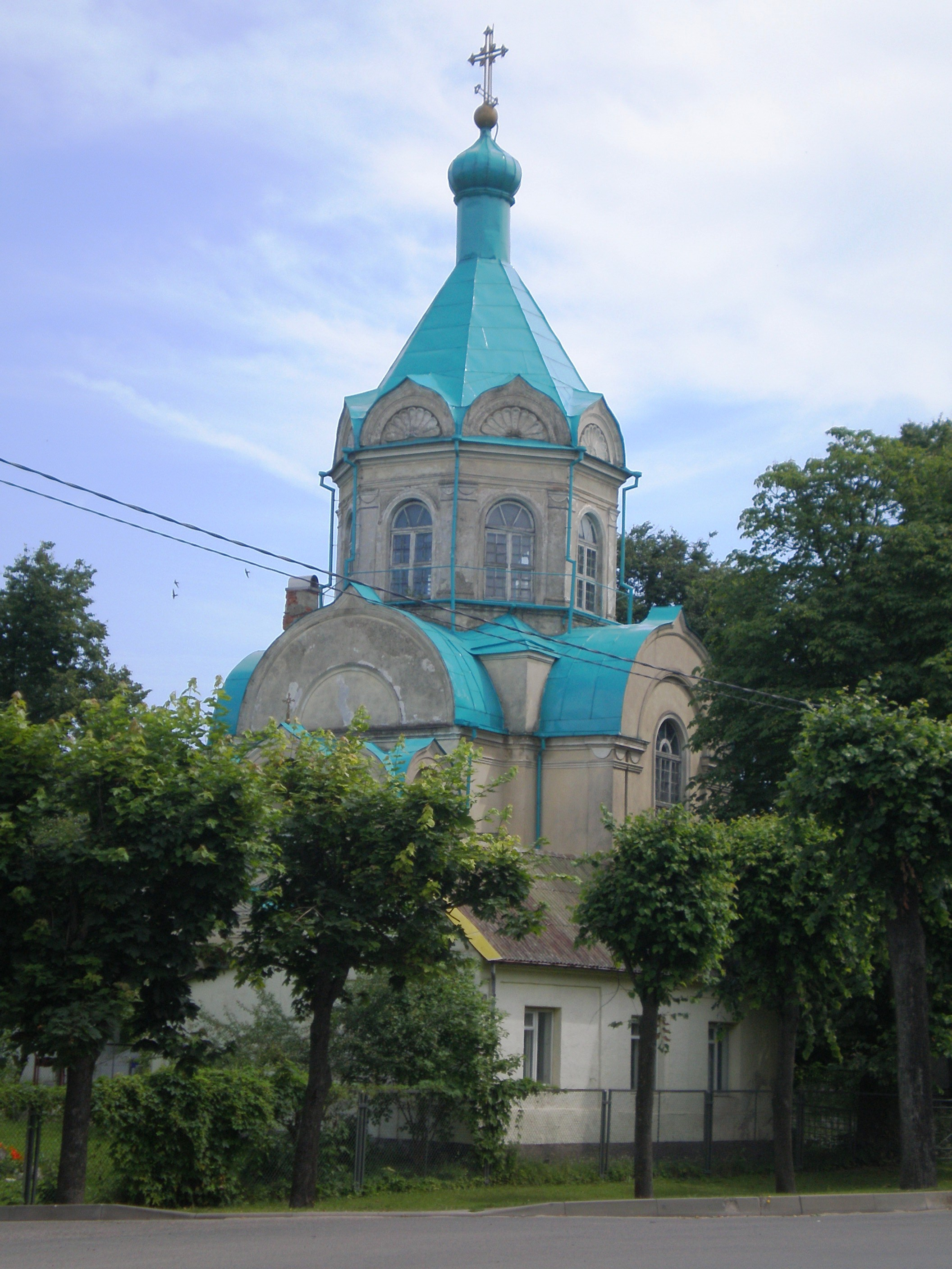 Kybartai (cerkvė), Vilkaviškio raj.